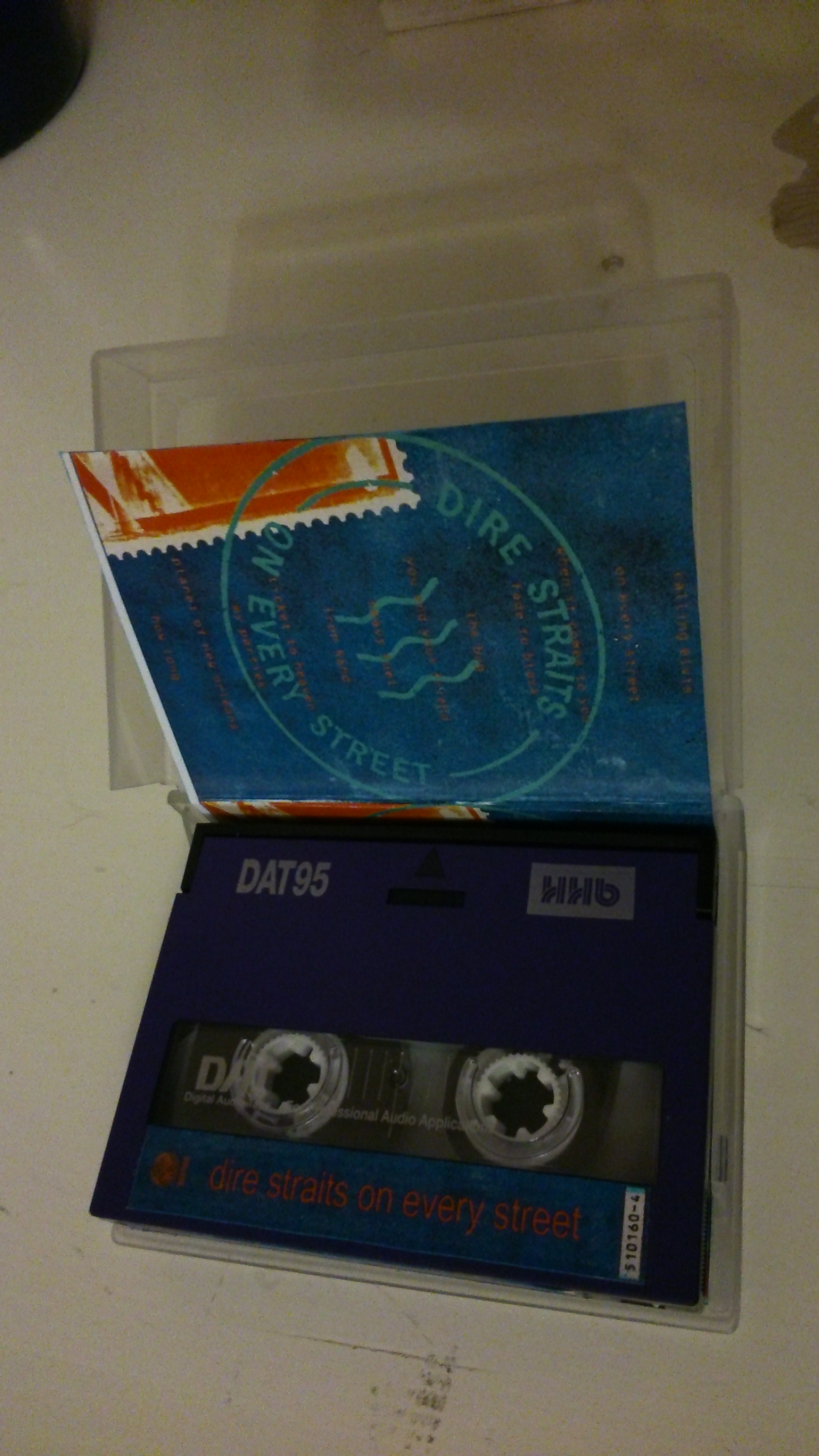 Casette numérique DAT dires straits on every street